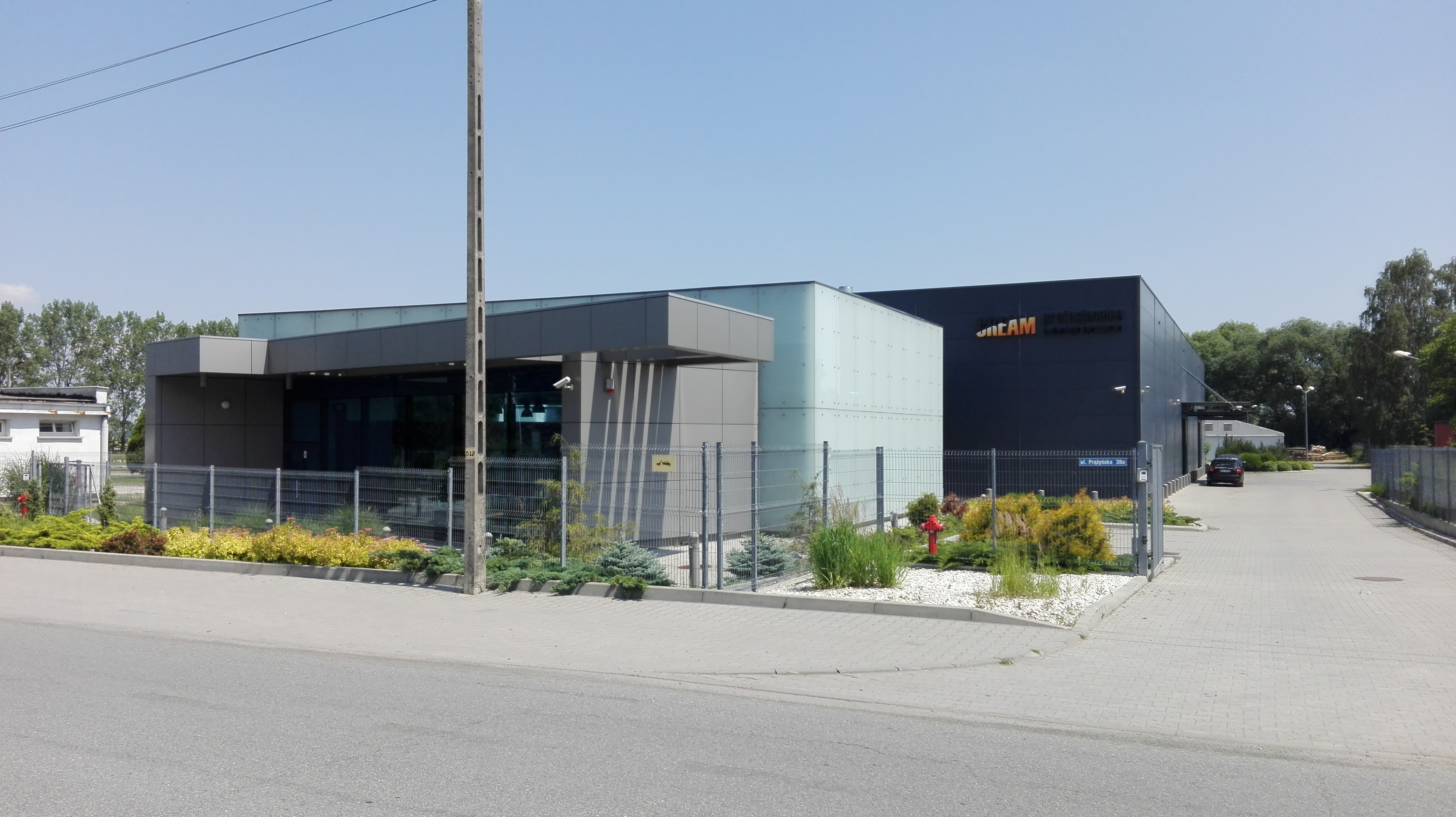 Prudnik, Serwis Cream Sp. z o.o